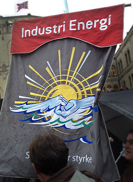 Industri Energis fane i en demonstrasjon utenfor Stortinget.